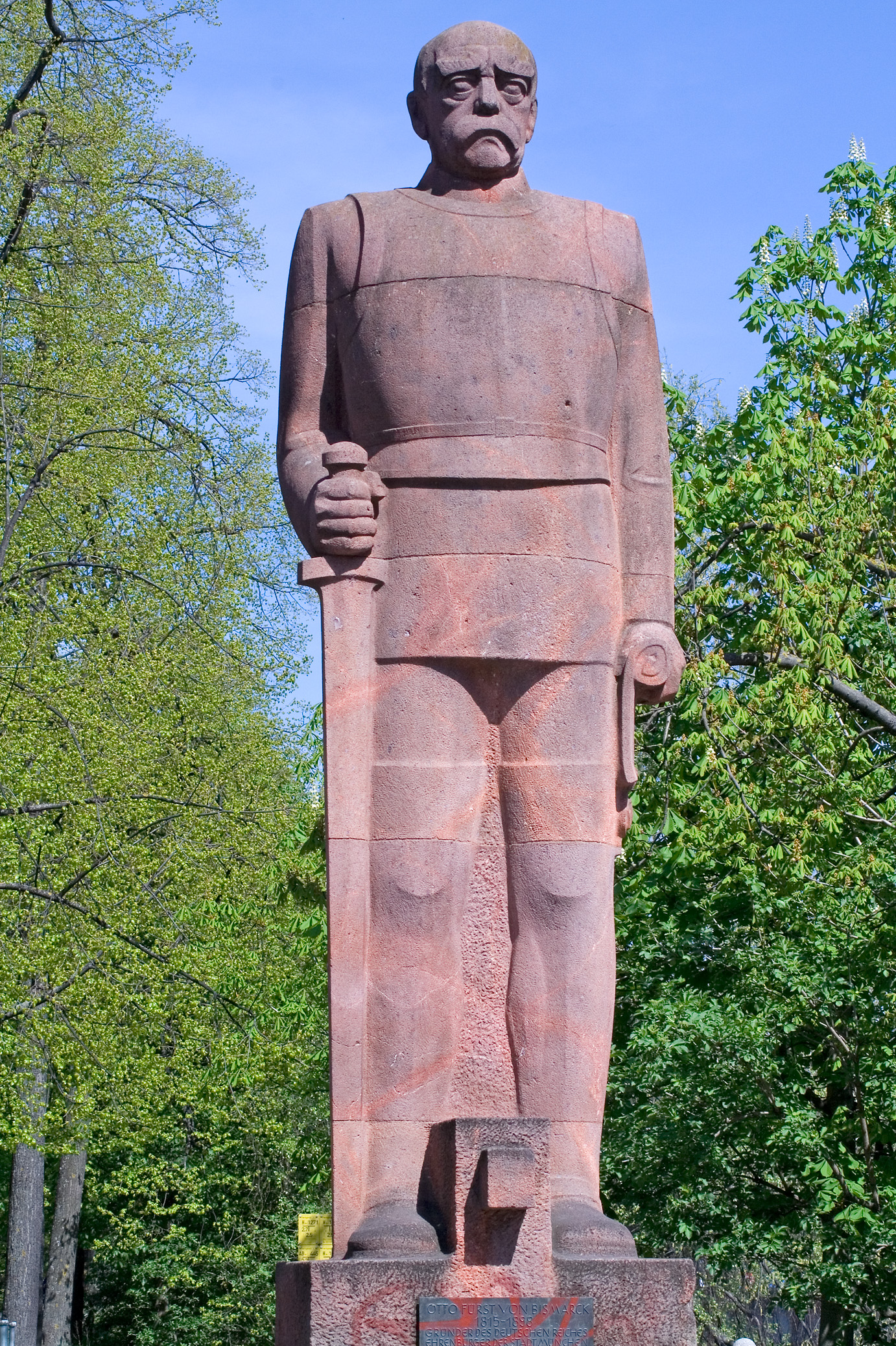 Otto von Bismarck-Denkmal in München am Deutschen Museum. Bildhauer: Fritz Behn